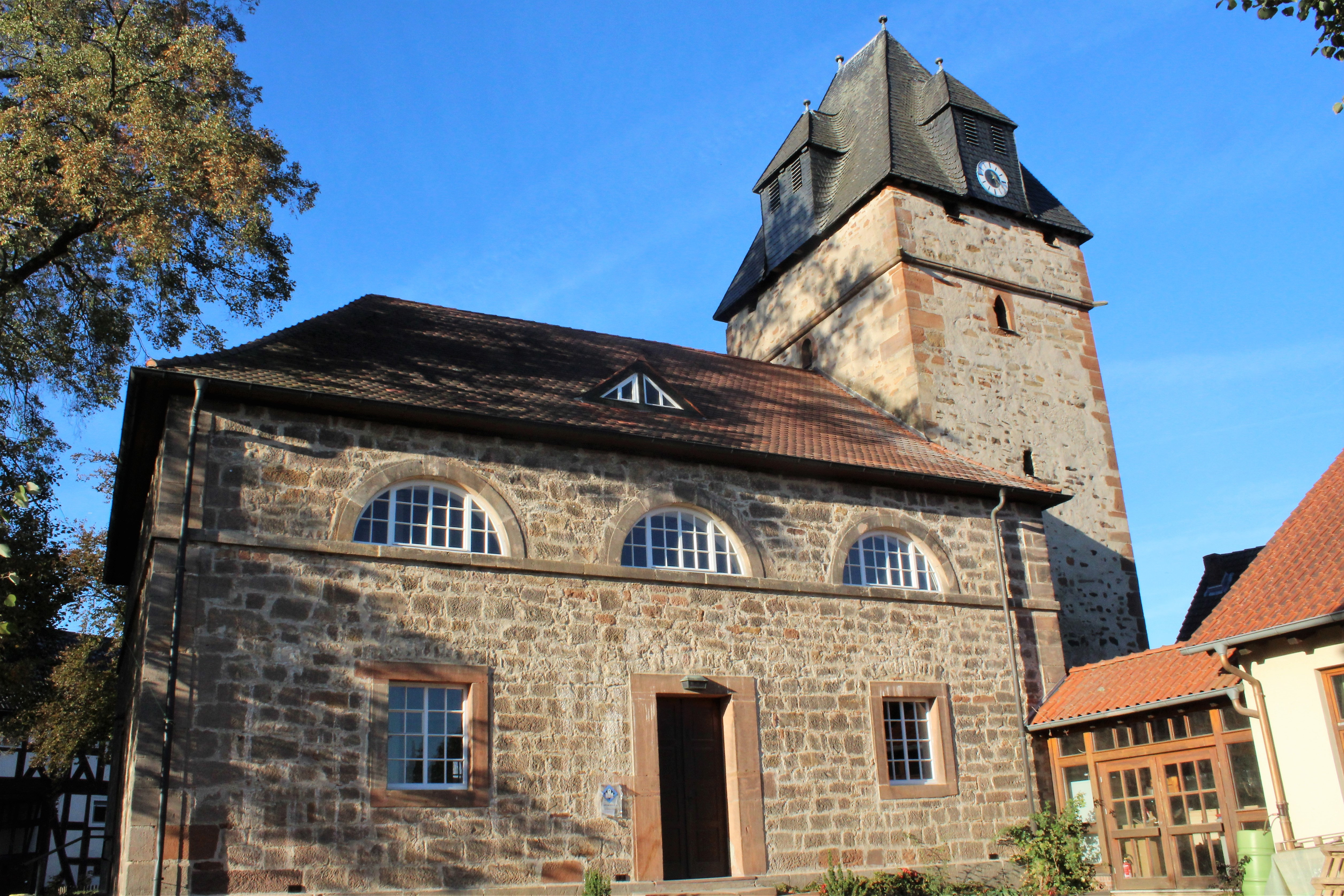 Evangelische Kirche Sterzhausen, Lahntal, Landkreis Marburg-Biedenkopf, Hessen, Deutschland